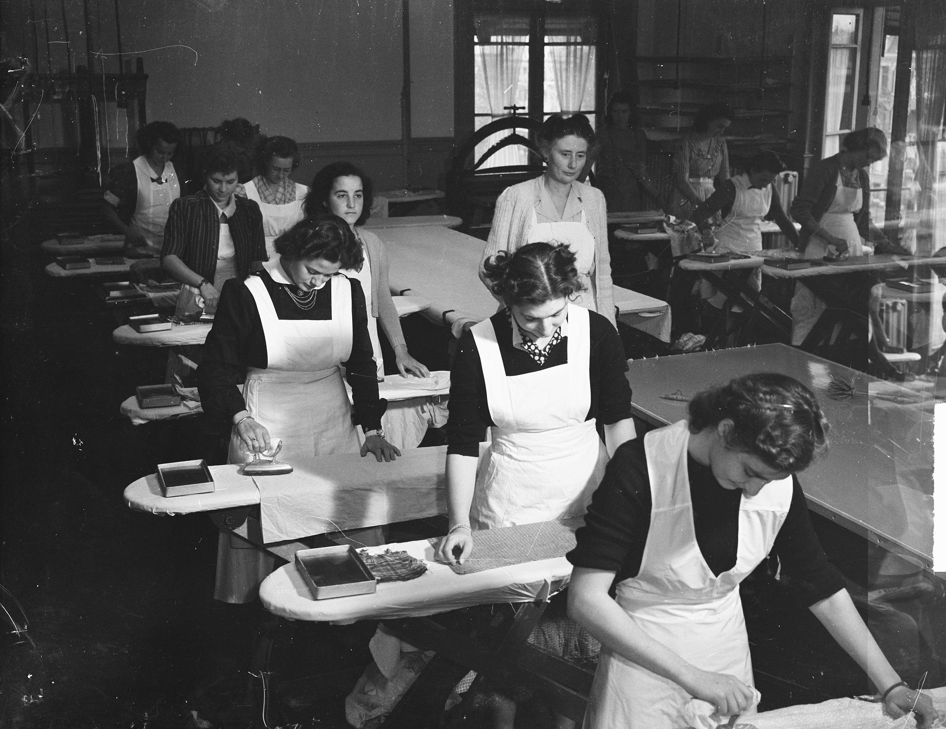 Collectie / Archief : Fotocollectie Anefo Reportage / Serie : [ onbekend ] Beschrijving : Meisjes krijgen les in strijken op de Amsterdamse Huishoudschool Datum : 12 oktober 1948 Trefwoorden : meisjes, strijken Fotograaf : Noske, J.D. / Anefo Auteursrechthebbende : Nationaal Archief Materiaalsoort : Glasnegatief Nummer archiefinventaris : bekijk toegang 2.24.01.09 Bestanddeelnummer : 903-0509